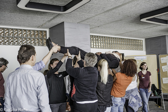 Während Treffs und Seminaren tauschen sich Betroffene und Angehörige aus. Wir sind nicht allein!